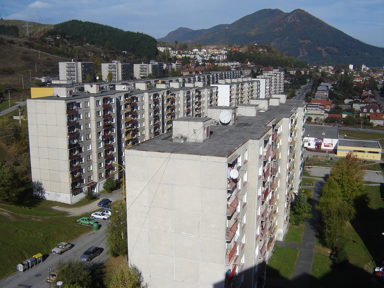 sídlisko Baničné